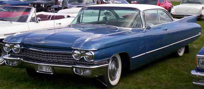 Cadillac Coupe De Ville 1960